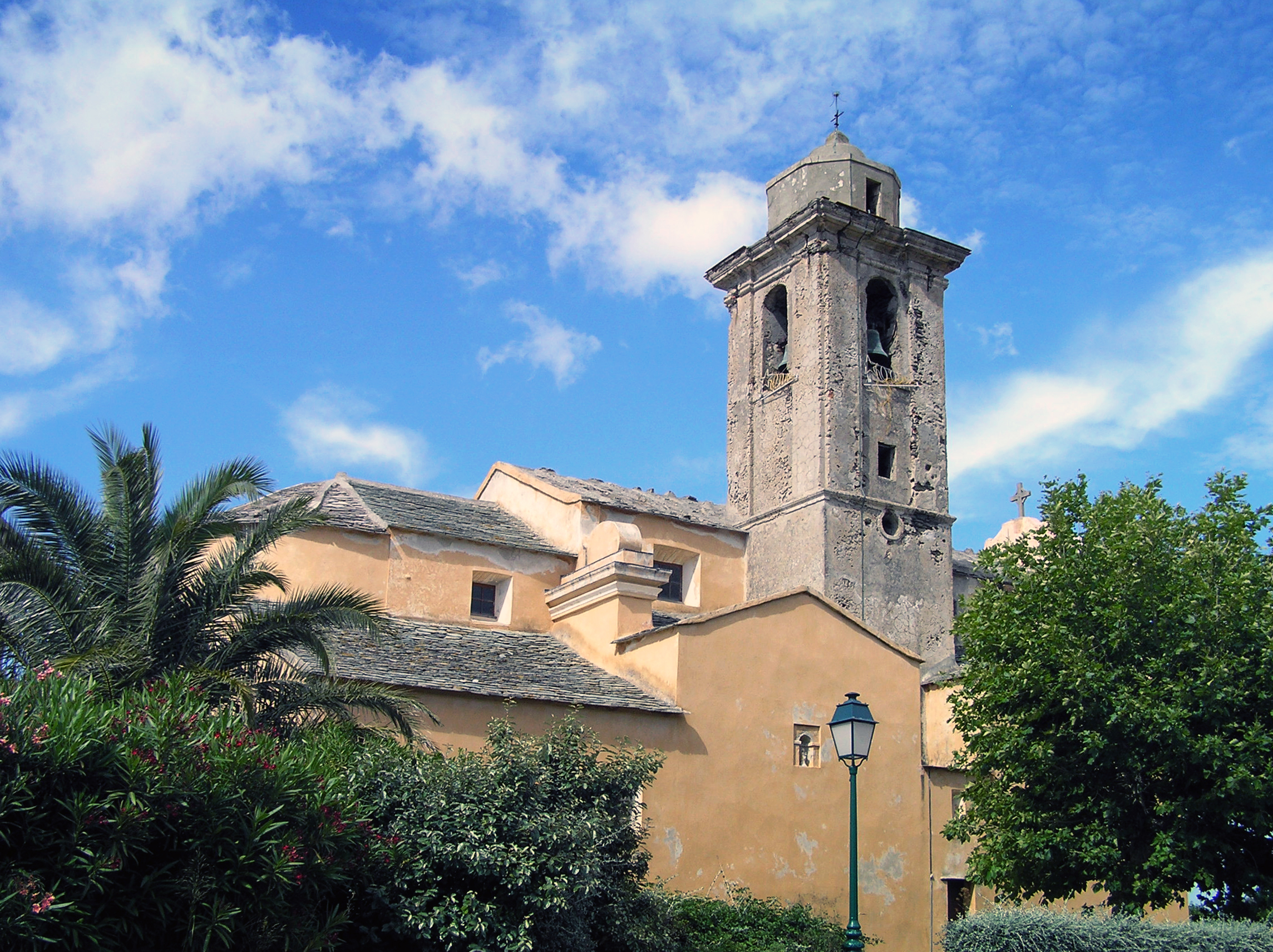 Tomino (Corse) - Clocher de l'église paroissiale San Nicolao à Stoppione